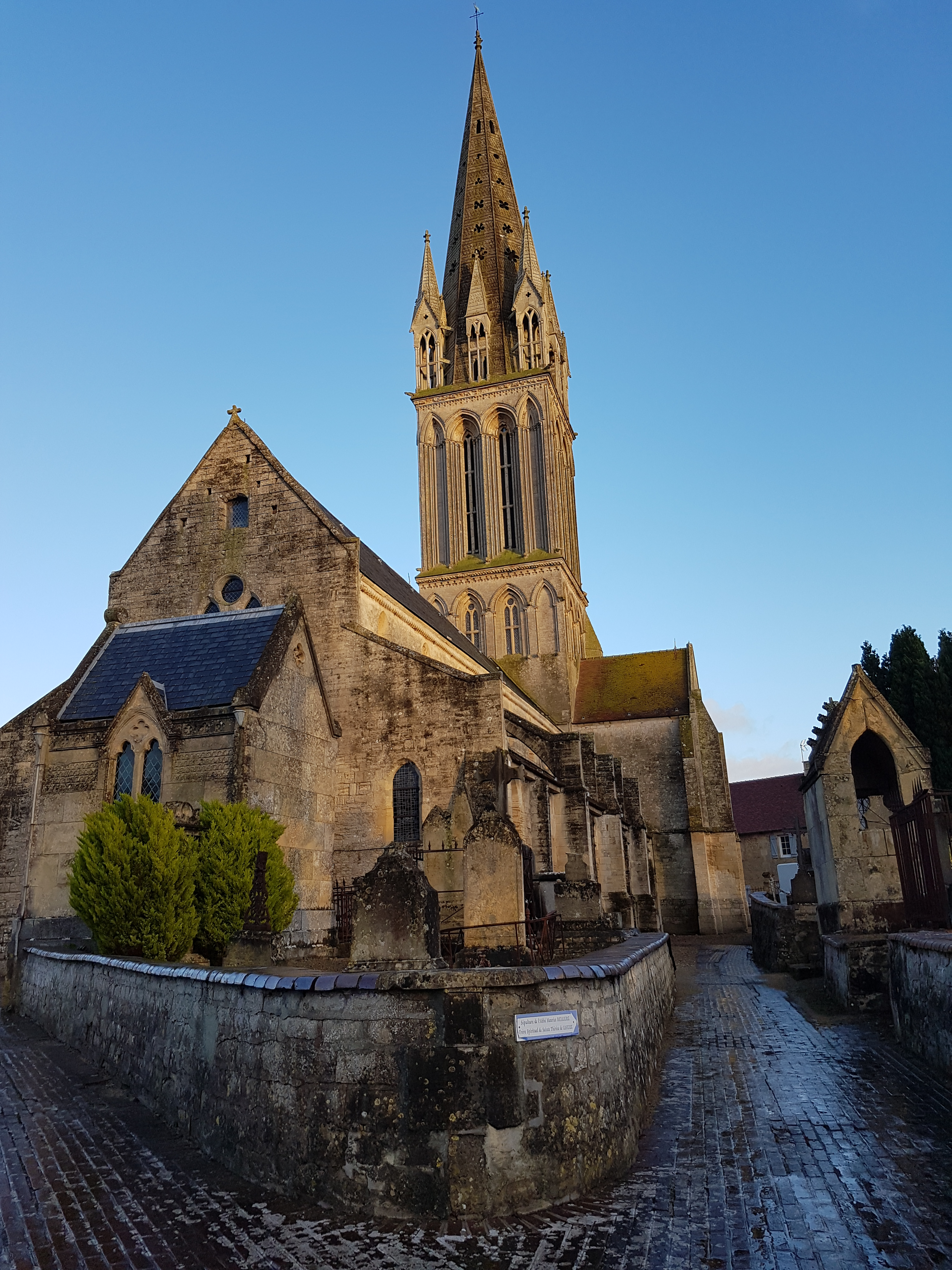 Église Saint-Martin de Langrune-sur-Mer en Janvier 2018 (Calvados, Basse Normandie)